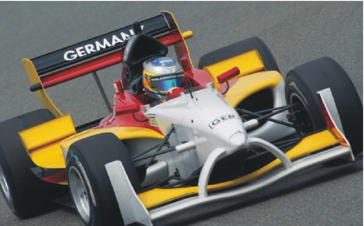 Sebastian Stahl ( Stiefbruder von Michael Schumacher ) am Start zum Saisonfinale des A1 Grand Prix in China für Deutschland 2006 im Team von Willi Weber